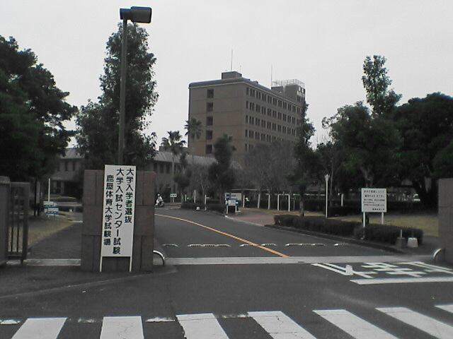 が撮影。鹿屋体育大学正門。